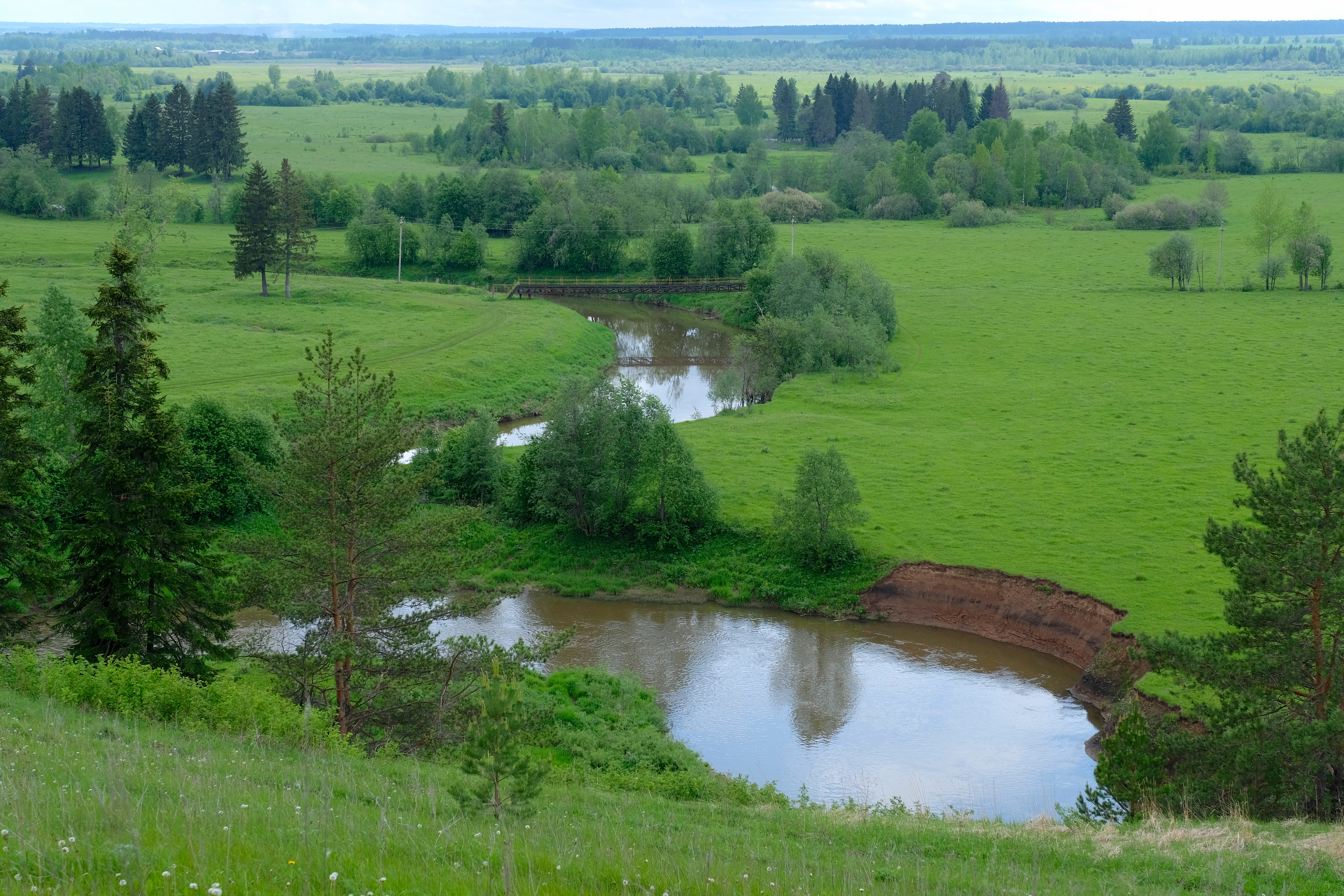 Река Лоза около деревни Сундур